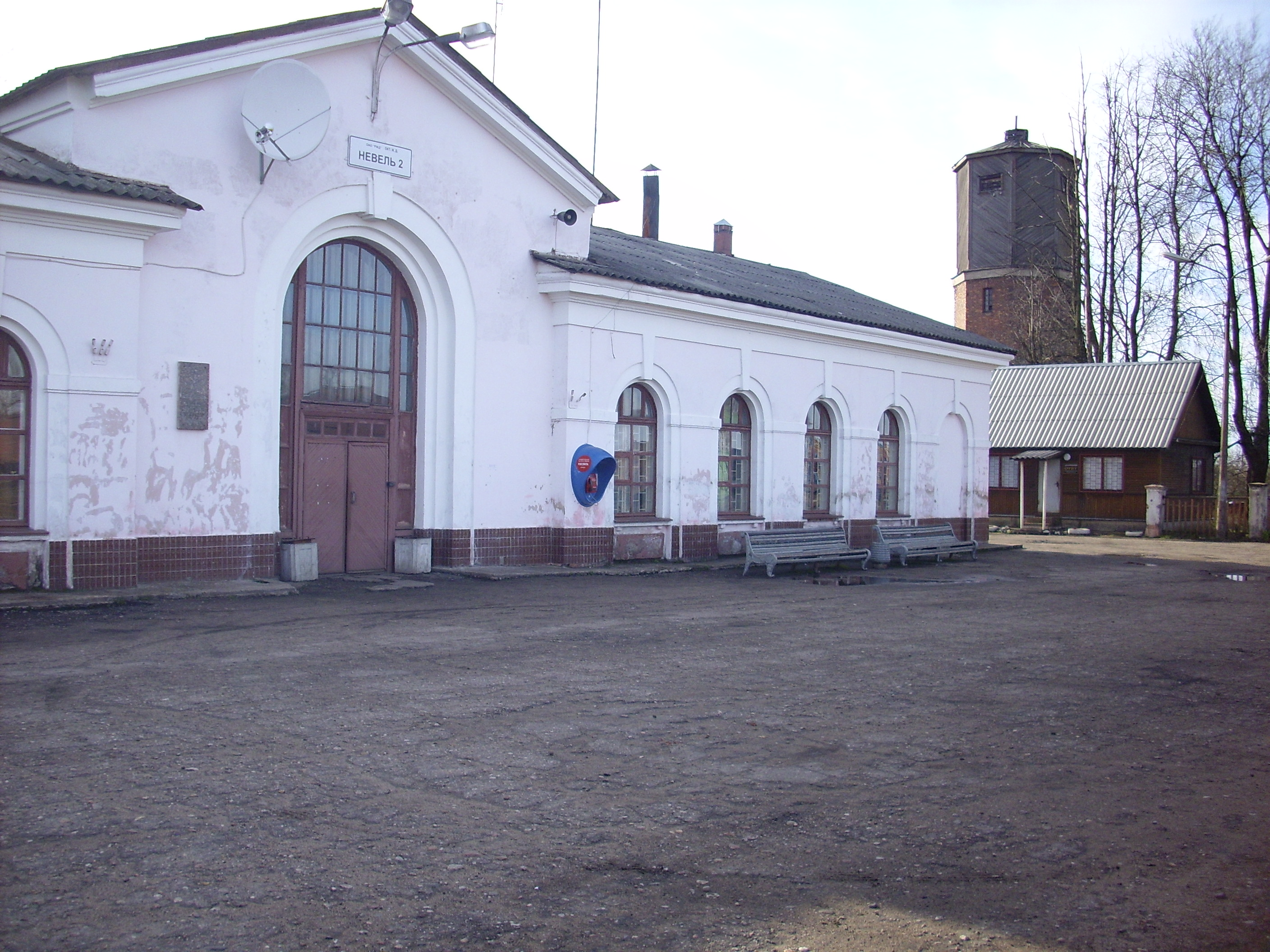 ЖД вокзал